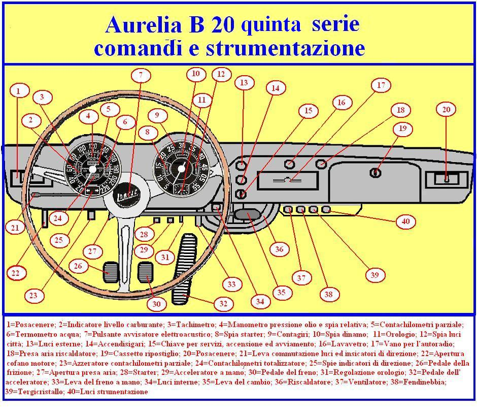 Immagine/disegno ottenuta "autonomamente" ovvero operando con il programma "Paint" di Windows, ispiarandosi (e traendo le necessarie informazioni) da quanto appare a pagina 19 del numero 6 dell'anno 1957 della rivista "Quattroruote"